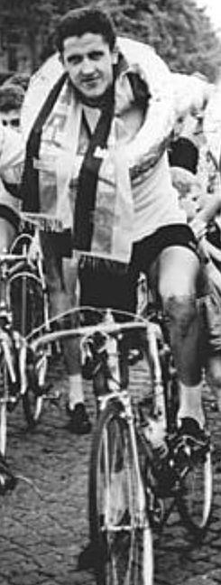 Lothar Appler, DDR-Radrennfahrer, Ausschnitt eines Fotos vom 18. Juni 1966